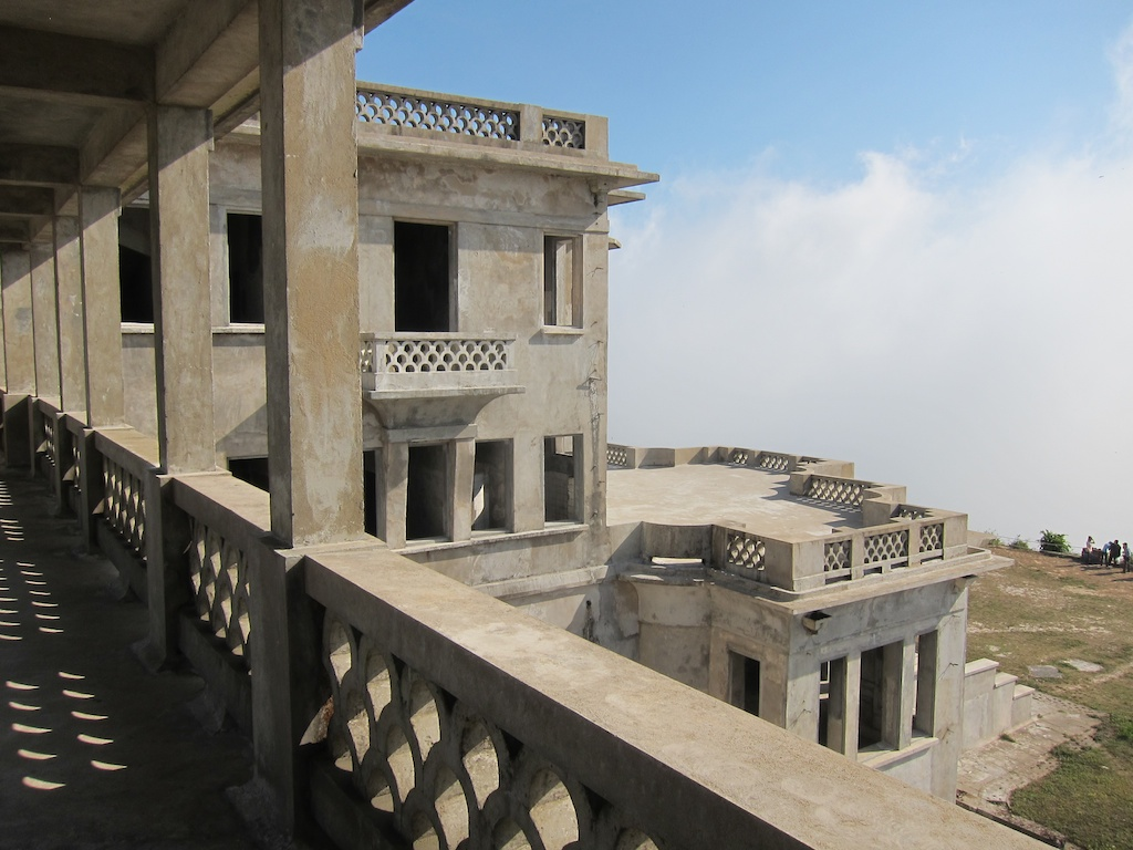 Le Bokor Palace rénové